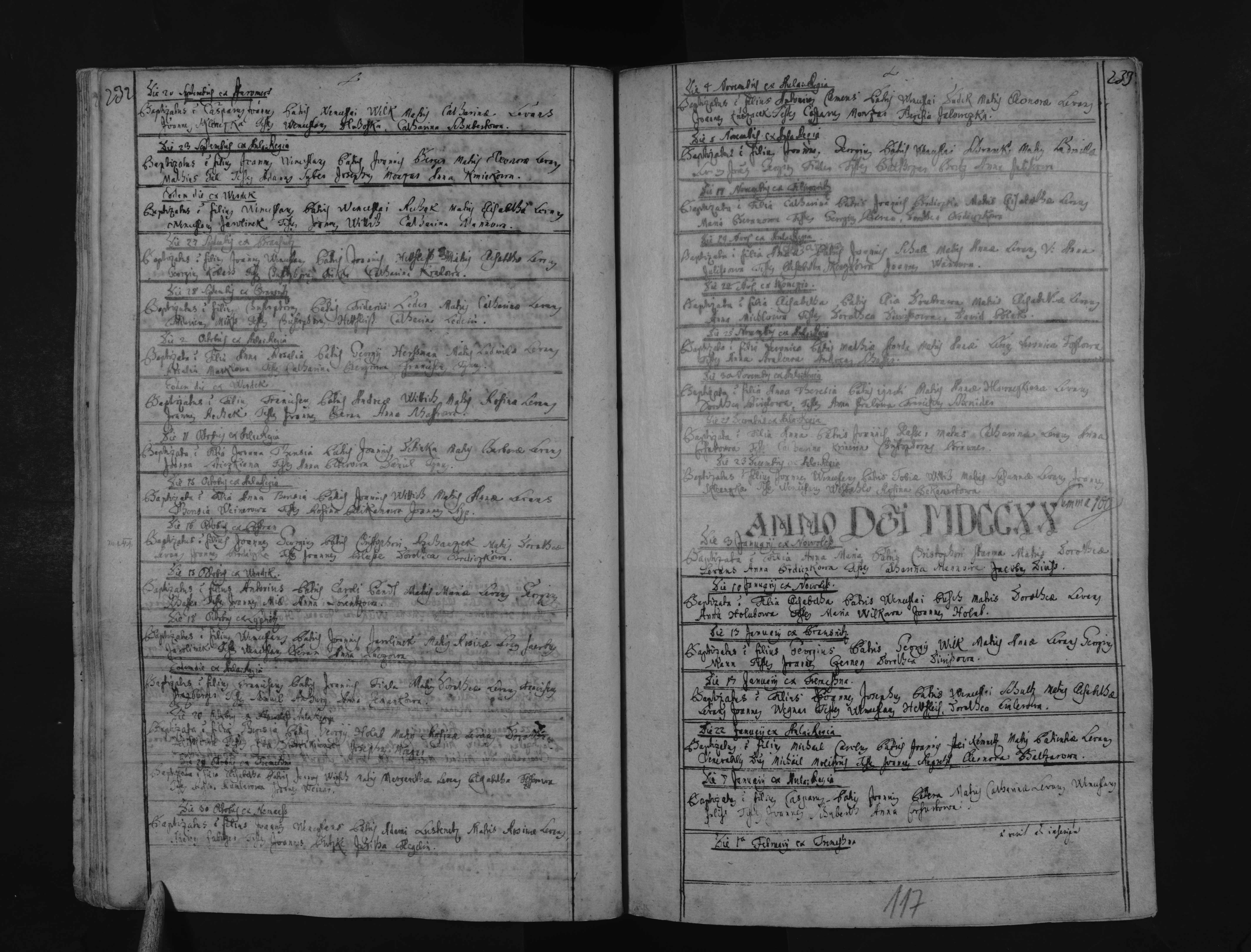 Johann Wenzel Bergl wurde am 23. September 1719 geboren und das ist der korrespondierende Kirchenbucheintrag.